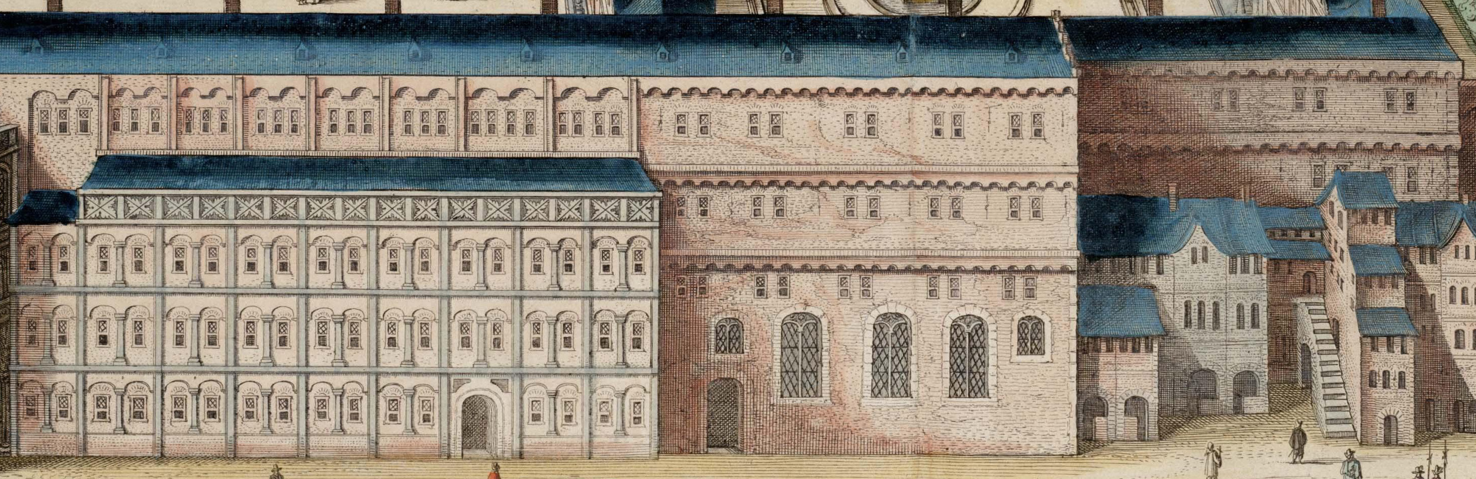 Palais episcopal de Liège façade meridionale romane avant l'incendie de 1734